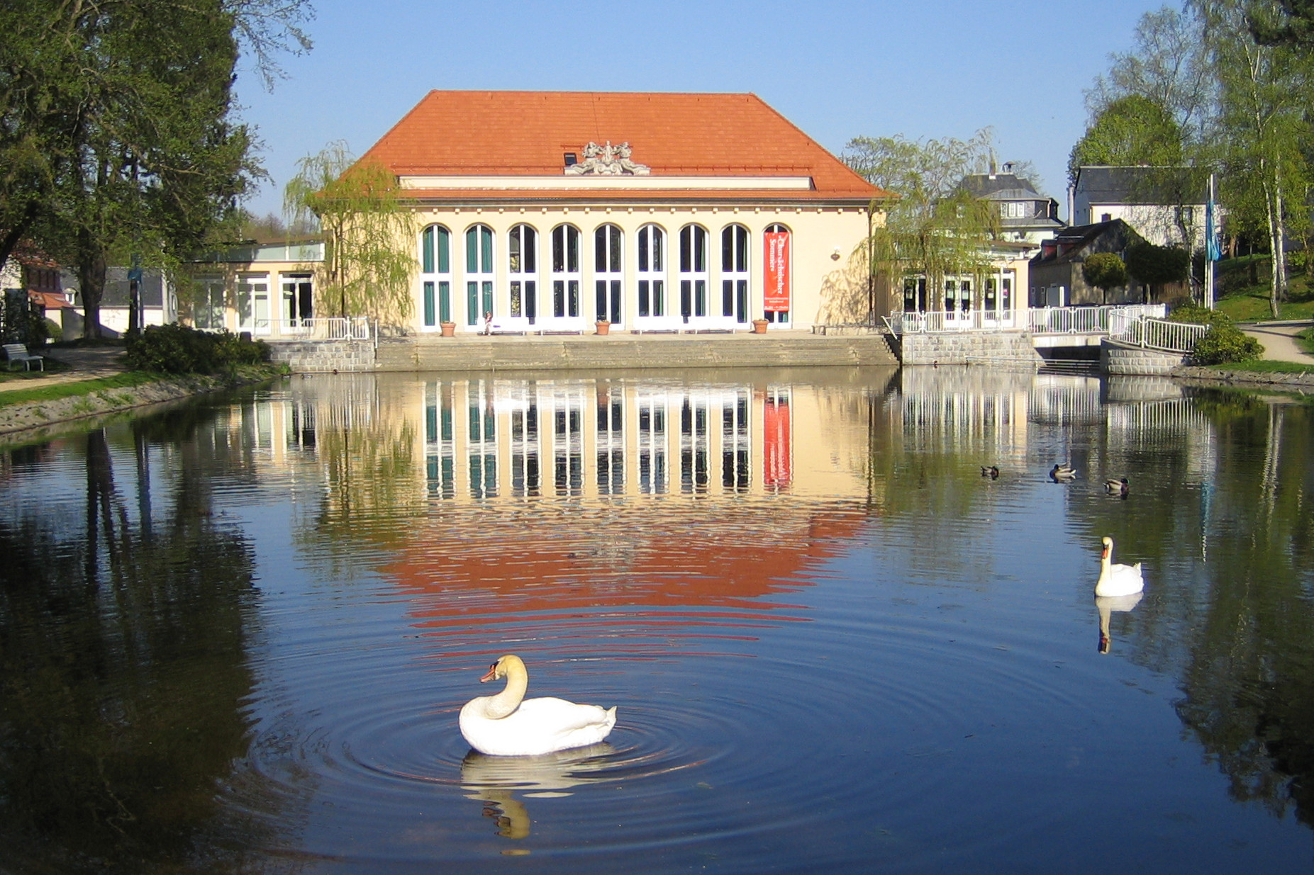 Bad Brambach: Im Kurpark